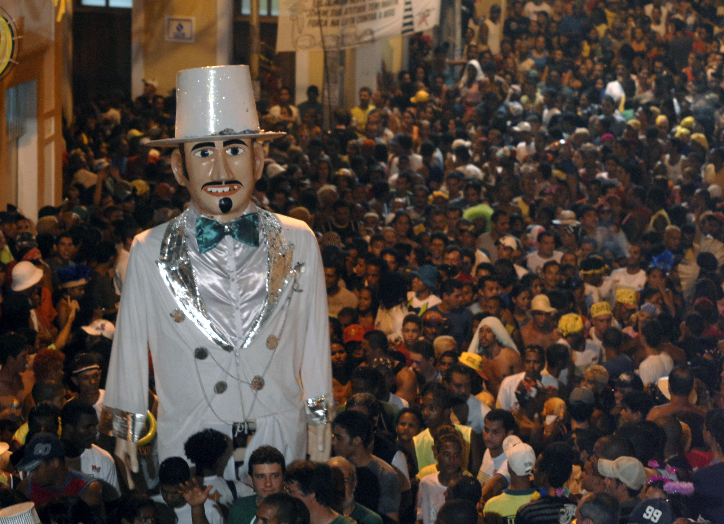 Homem da meia-noite, Carnaval do Olinda, Pernambuco, Brazil